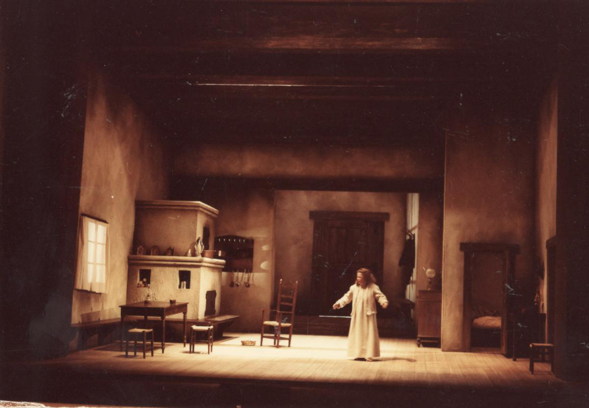 Jenufa